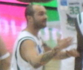 Avellino-Siena Valerio Spinelli (n°9)